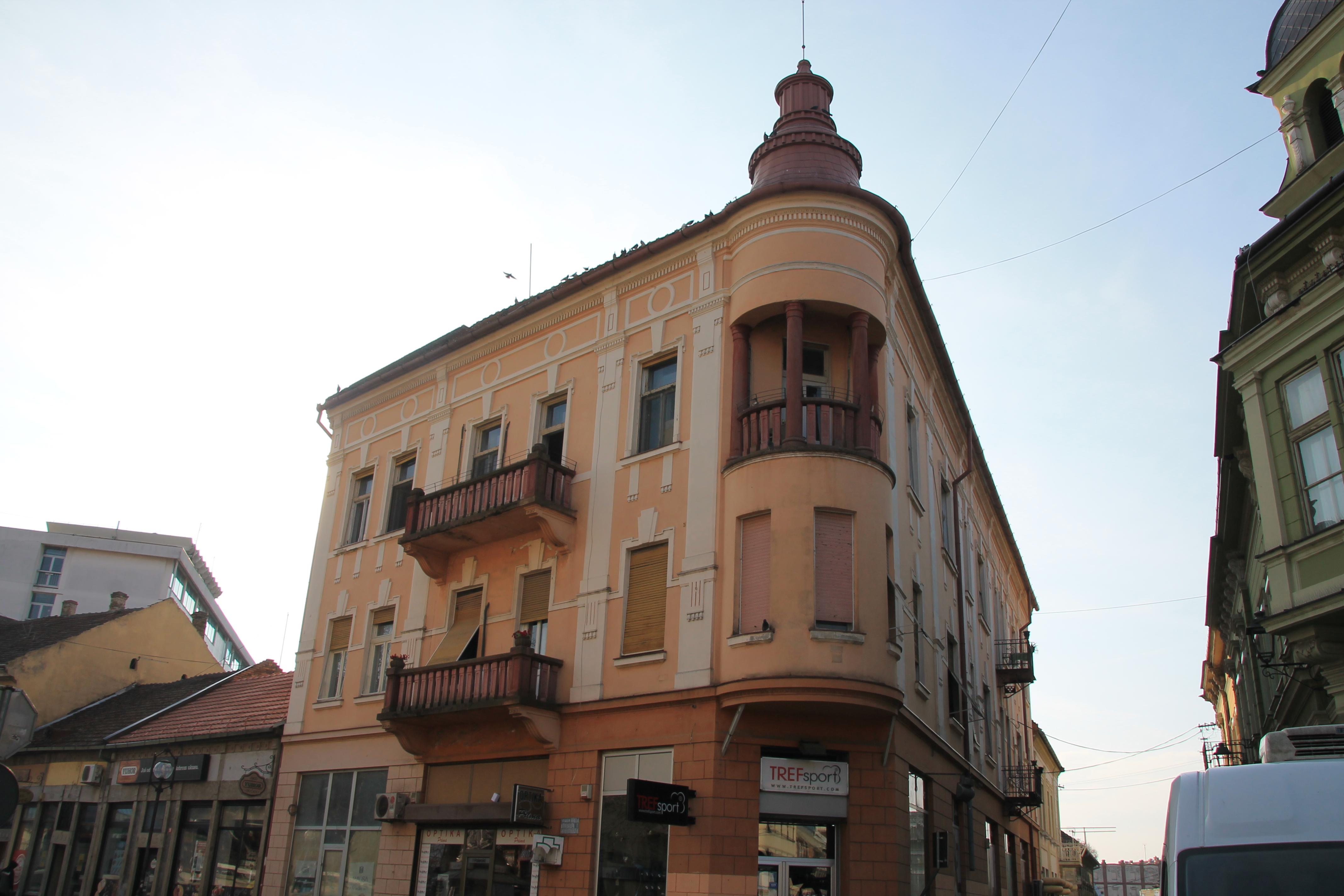 Staro jezgro Zrenjanina